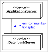 Knoten (UML2) - Beispiel 5